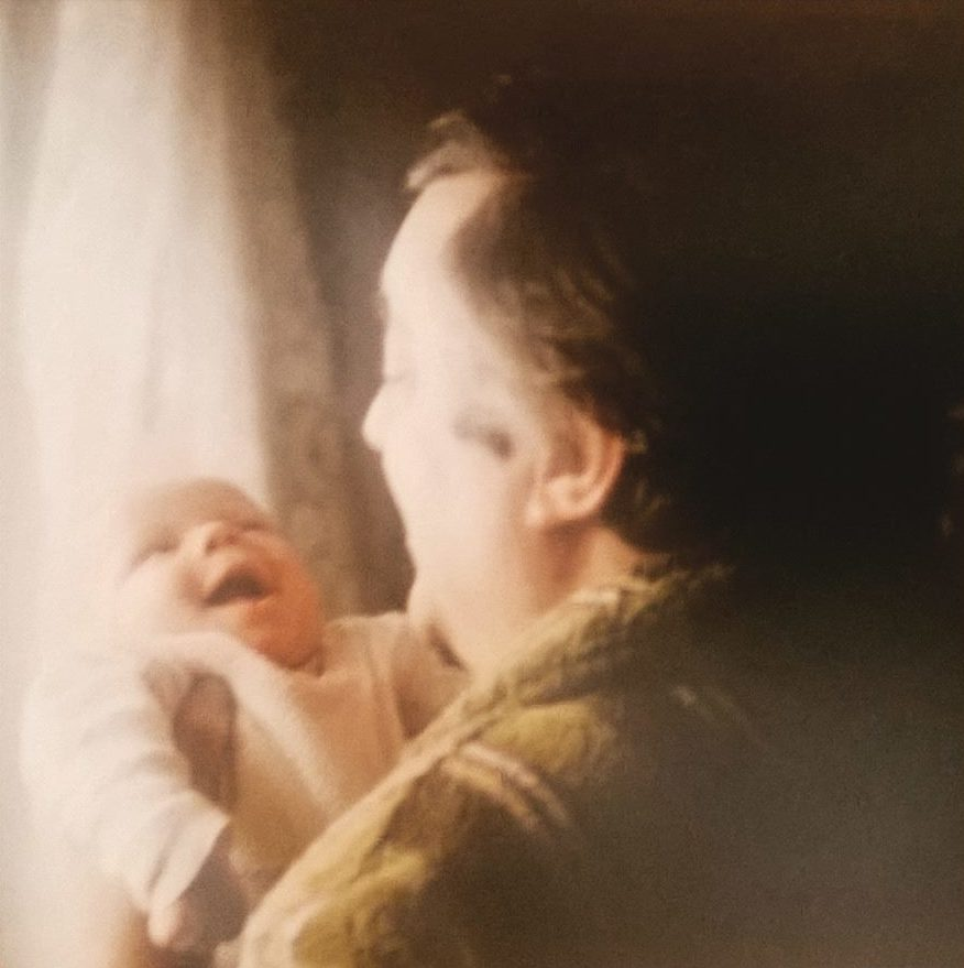 Jaromír Kaňák